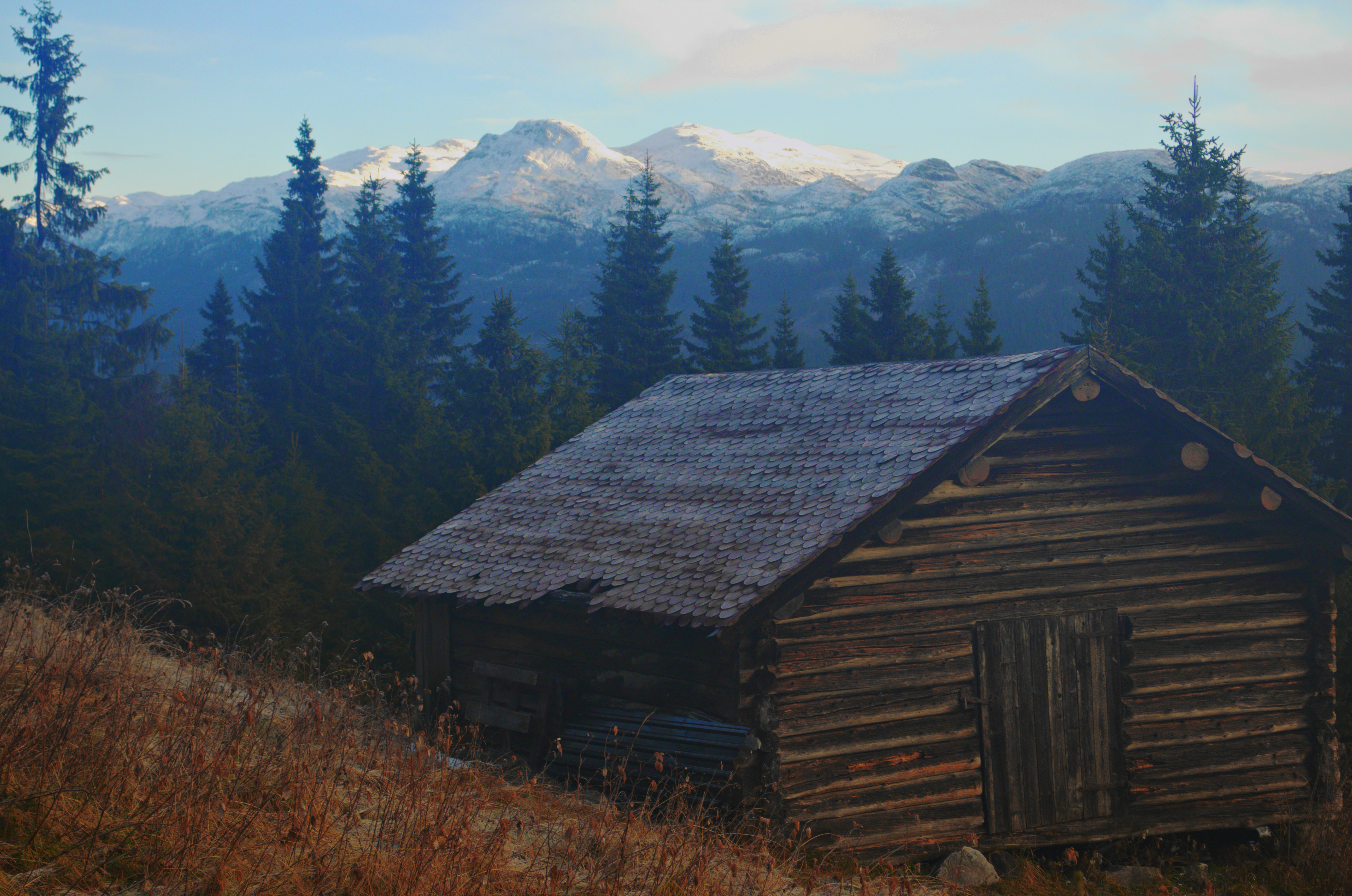 Mælefjell fra Karlstaul